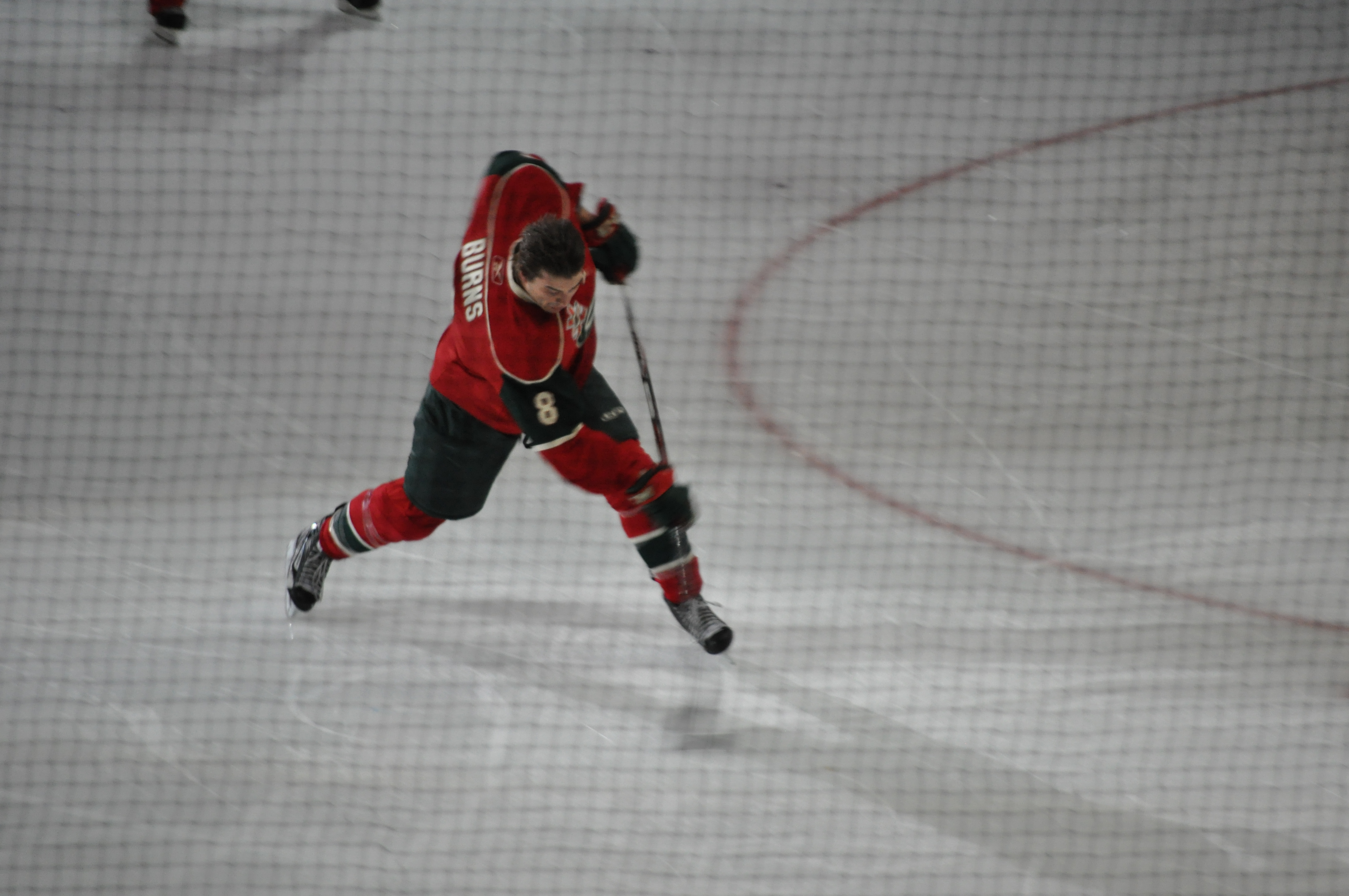 Hardest Shot